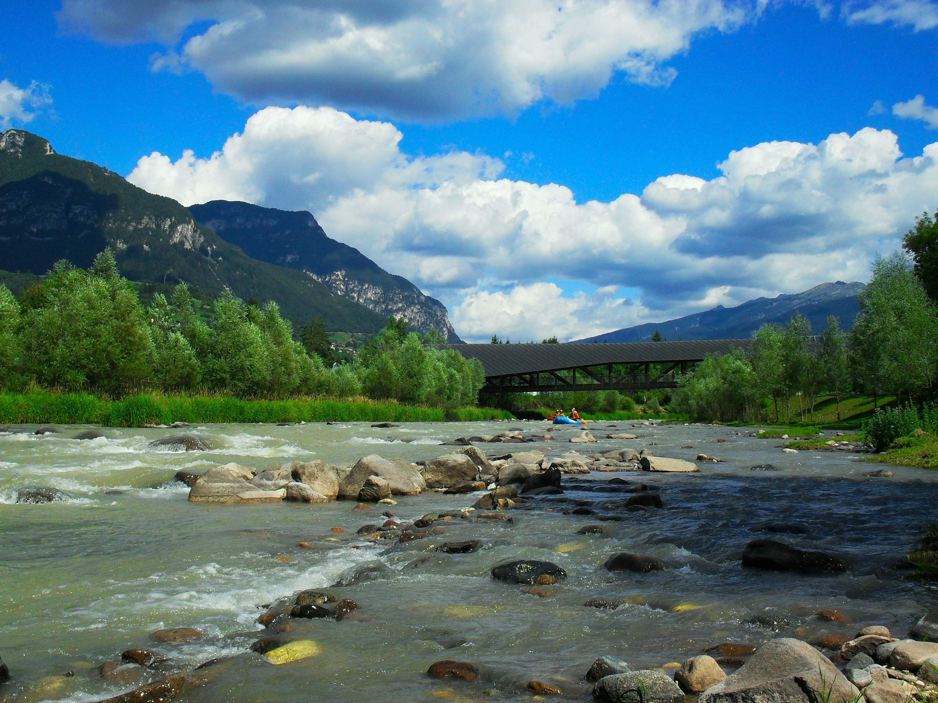 Scatto estivo del torrente Avisio (Val di Fiemme)